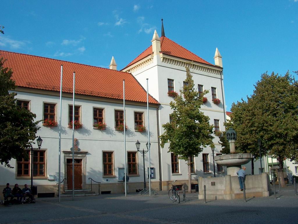 Beschreibung: Rathaus von Oschersleben Quelle: fotografiert am 13. September 2004 Fotograf: lotron Andere Versionen: Lizenzstatus: GNU FDL Kategorie:Bild:Rathaus